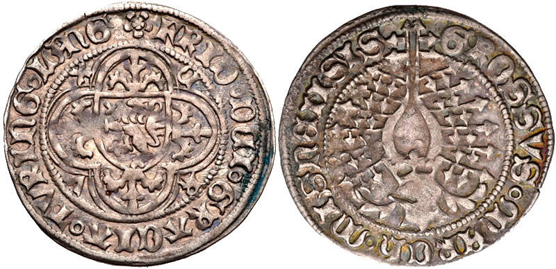 GERMANY, Sachsen. Friedrich IV. 1381-1428. AR Helmgroschen (29mm, 2.84 g, 9h). Freiberg mint. Struck 1405-1423. Coat of arms / Helmet. Krug 665/2. VF, toned.